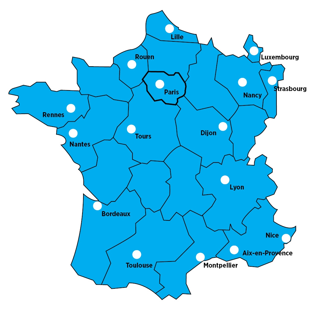 L'implantation de Hays en France et au Luxembourg